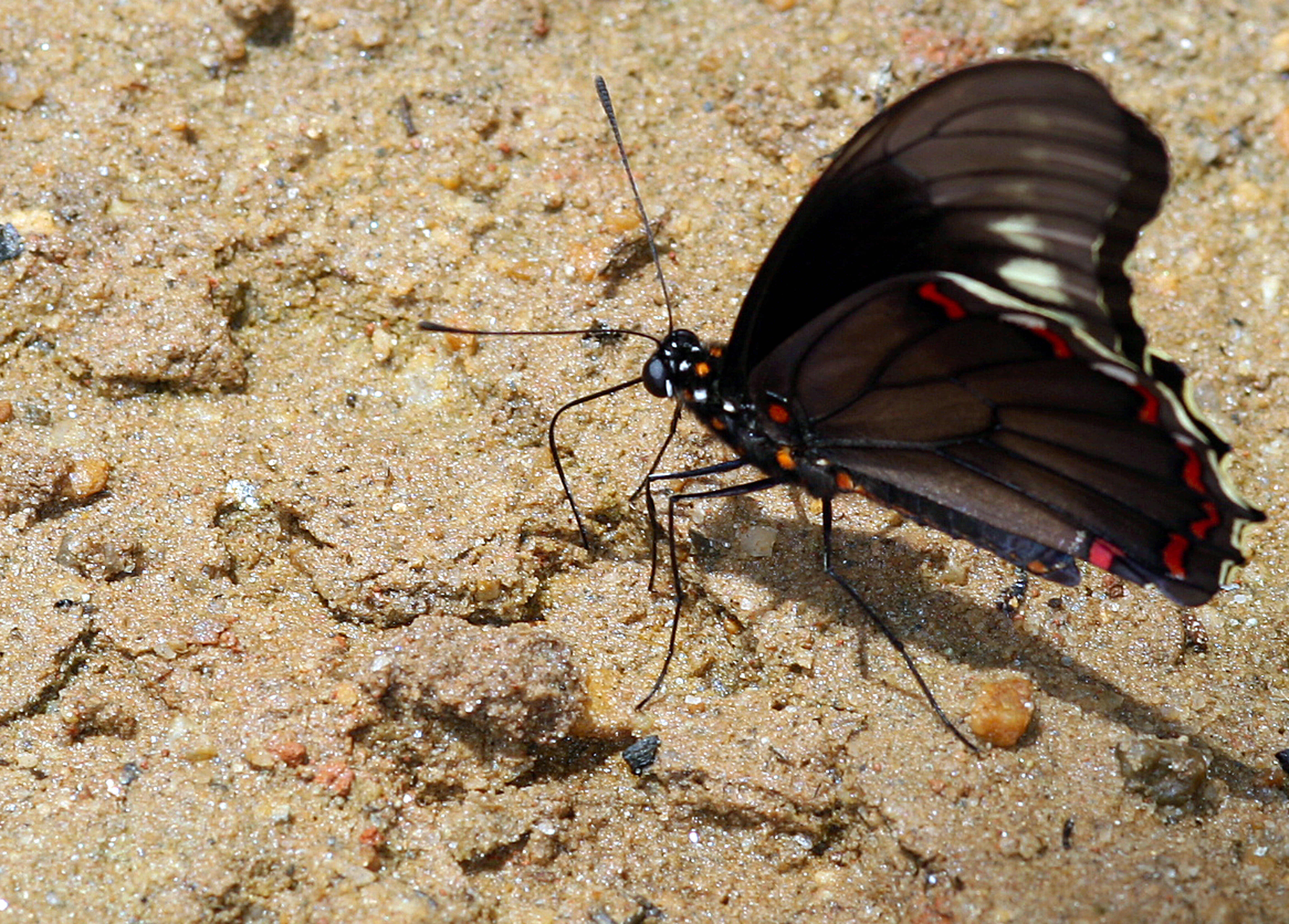 Nome: Battus polydamas Família: Papilionidae Sub-Família: Nome comum: Planta hospedeira: Aristolochia galeata Nome comum: Papo de peru